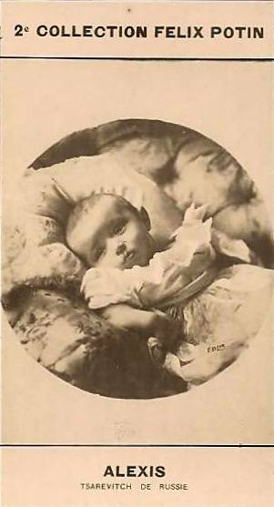 Alexis, tsarevitch de Russie